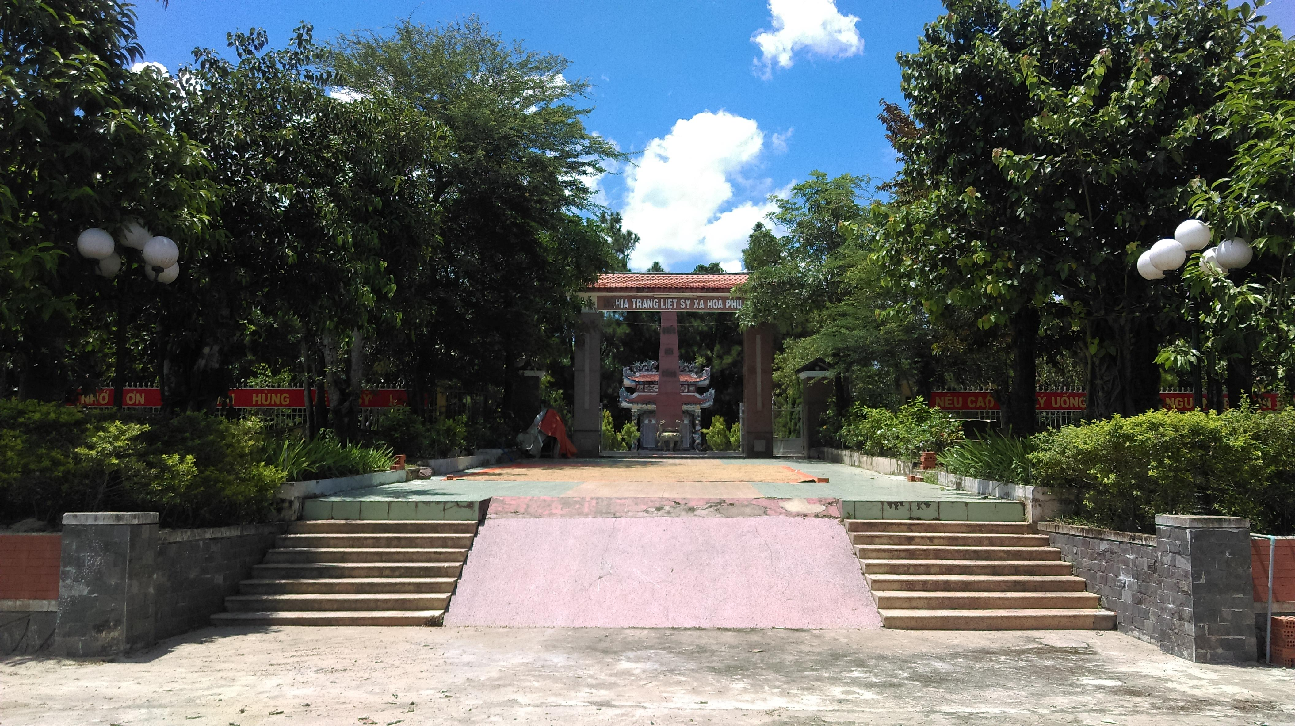 Nghĩa trang Liệt sĩ xã Hòa Phú, Hòa Vang, Đà Nẵng